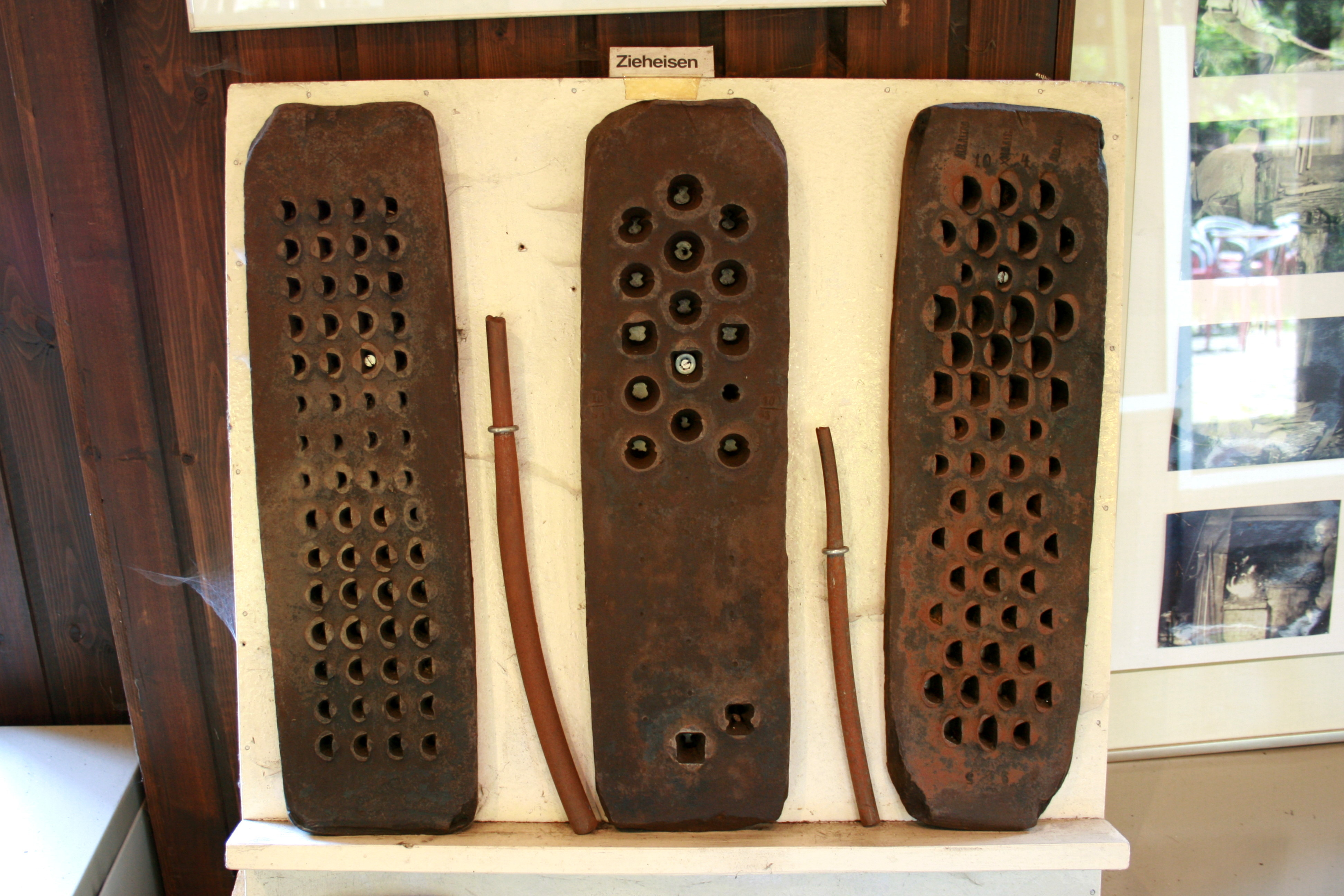 Bremecker Hammer in Lüdenscheid